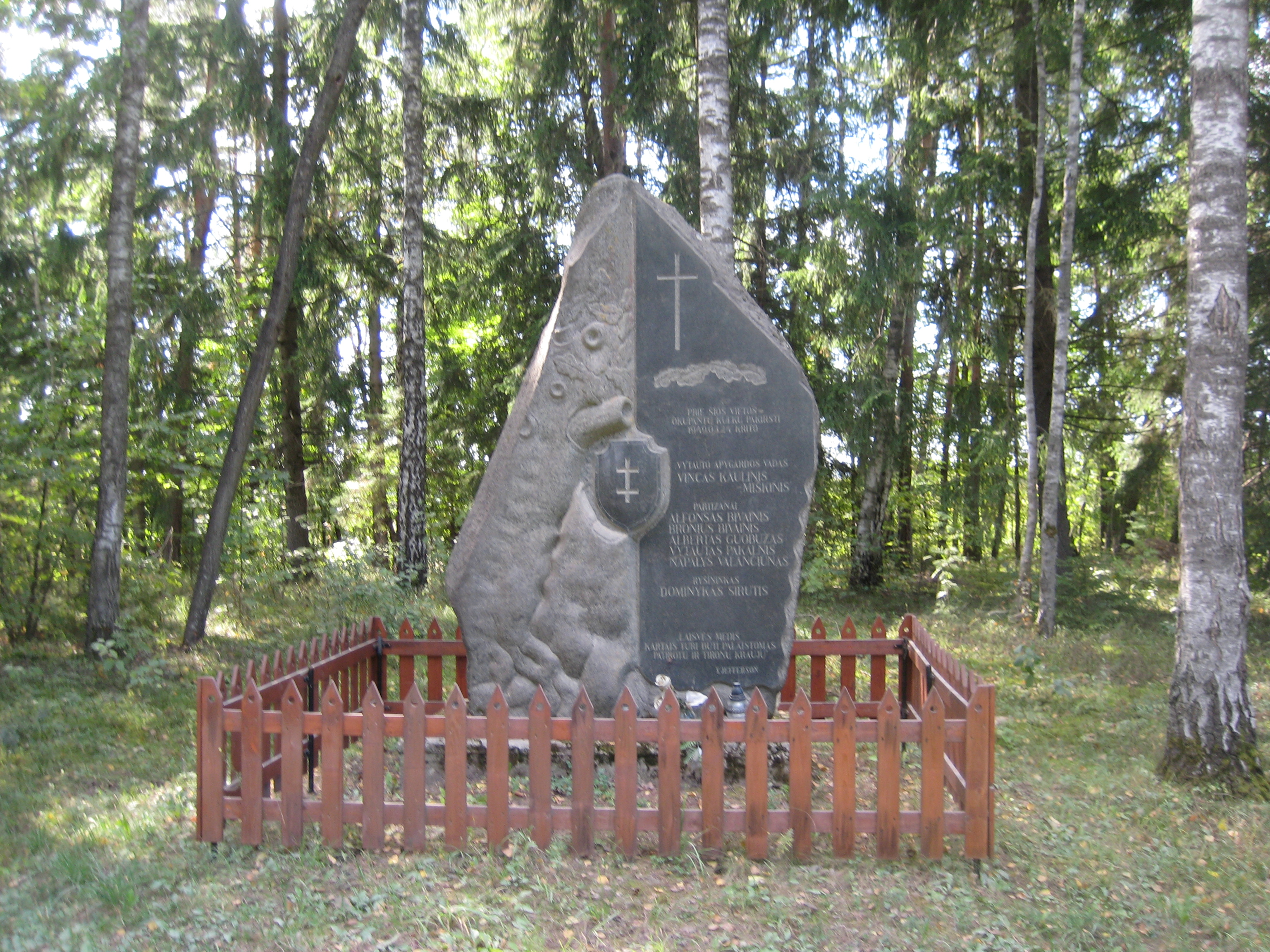 Sudeikių sen., Lithuania